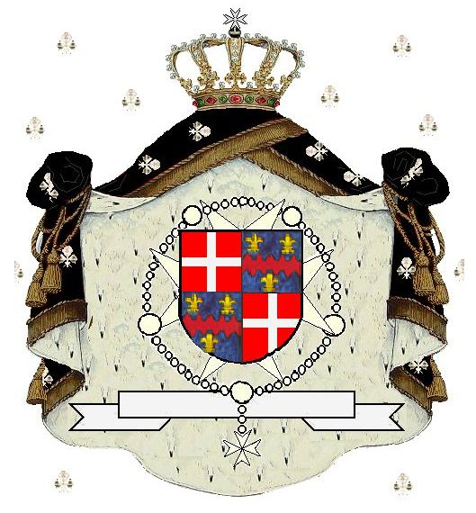 Wapen van Angelo de Mojana als grootmeester gekwartierd met dat van de Orde van Malta